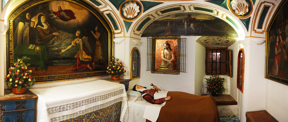 En esta Celda paso sus últimos días Santa Teresa de Jesús